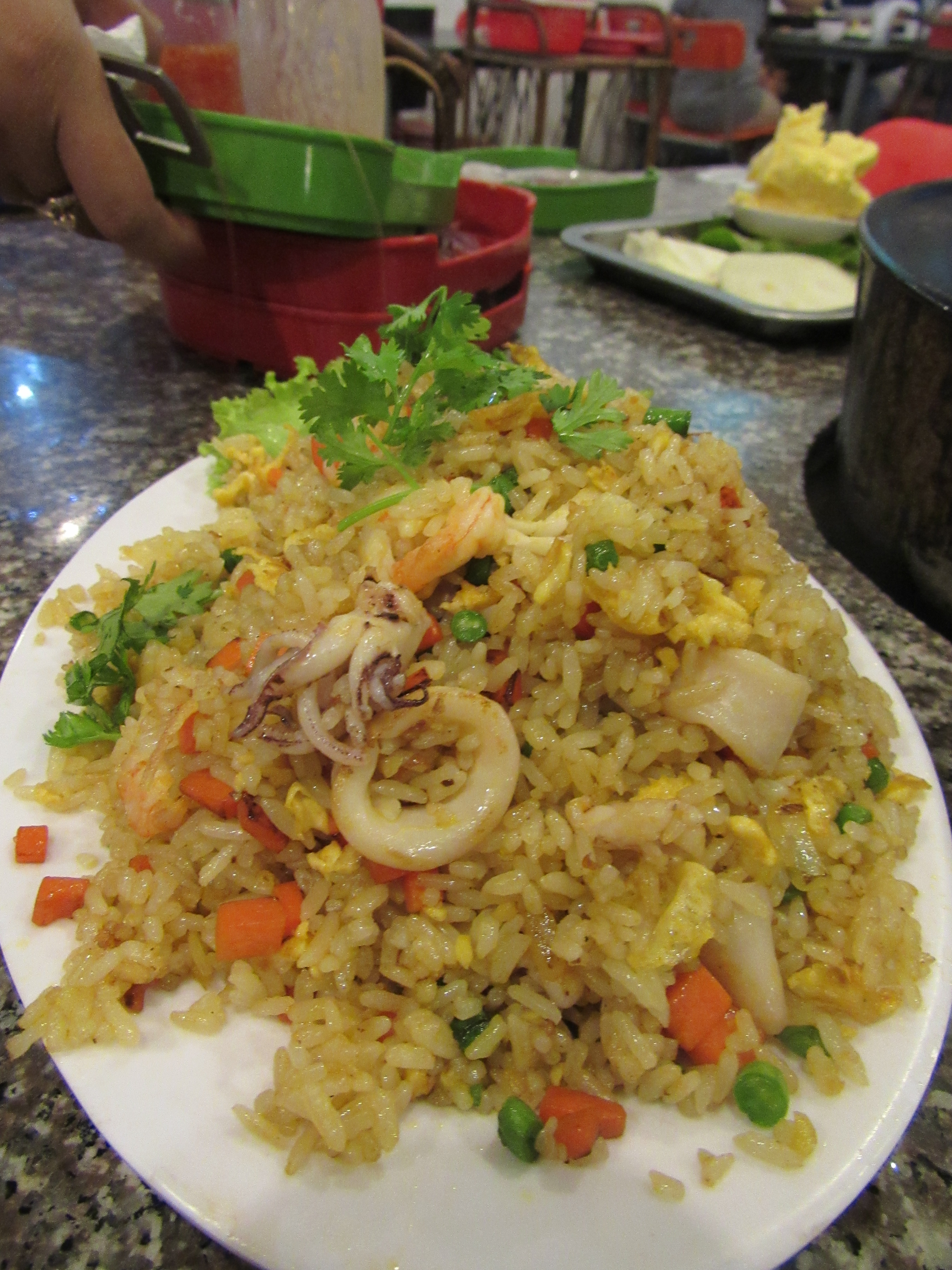 Phnom Penh, Cambodia.